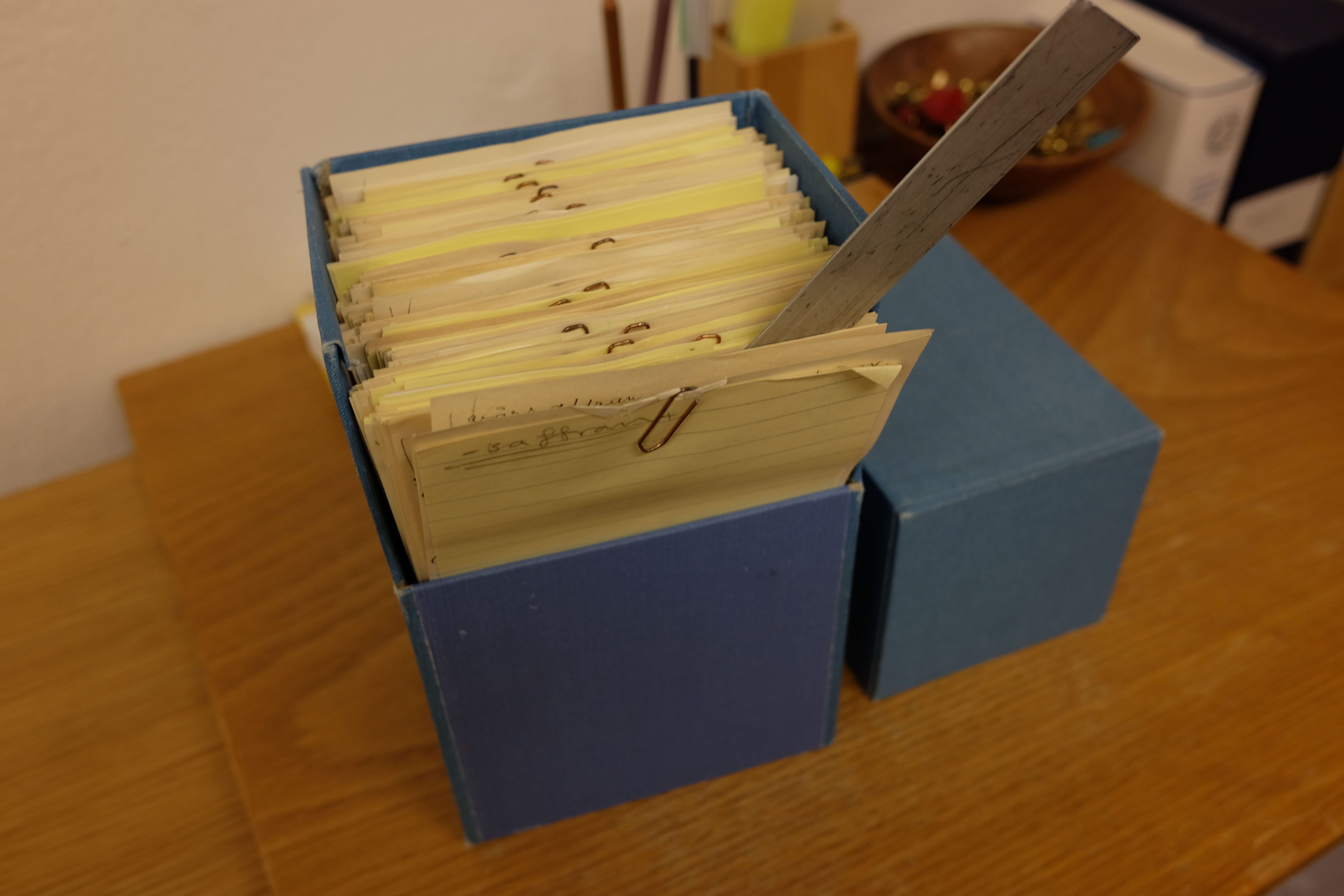 Svenska Akademiens ordboksredaktion, Lund. Excerpter. Det finns nio miljoner lappar på redaktionen.